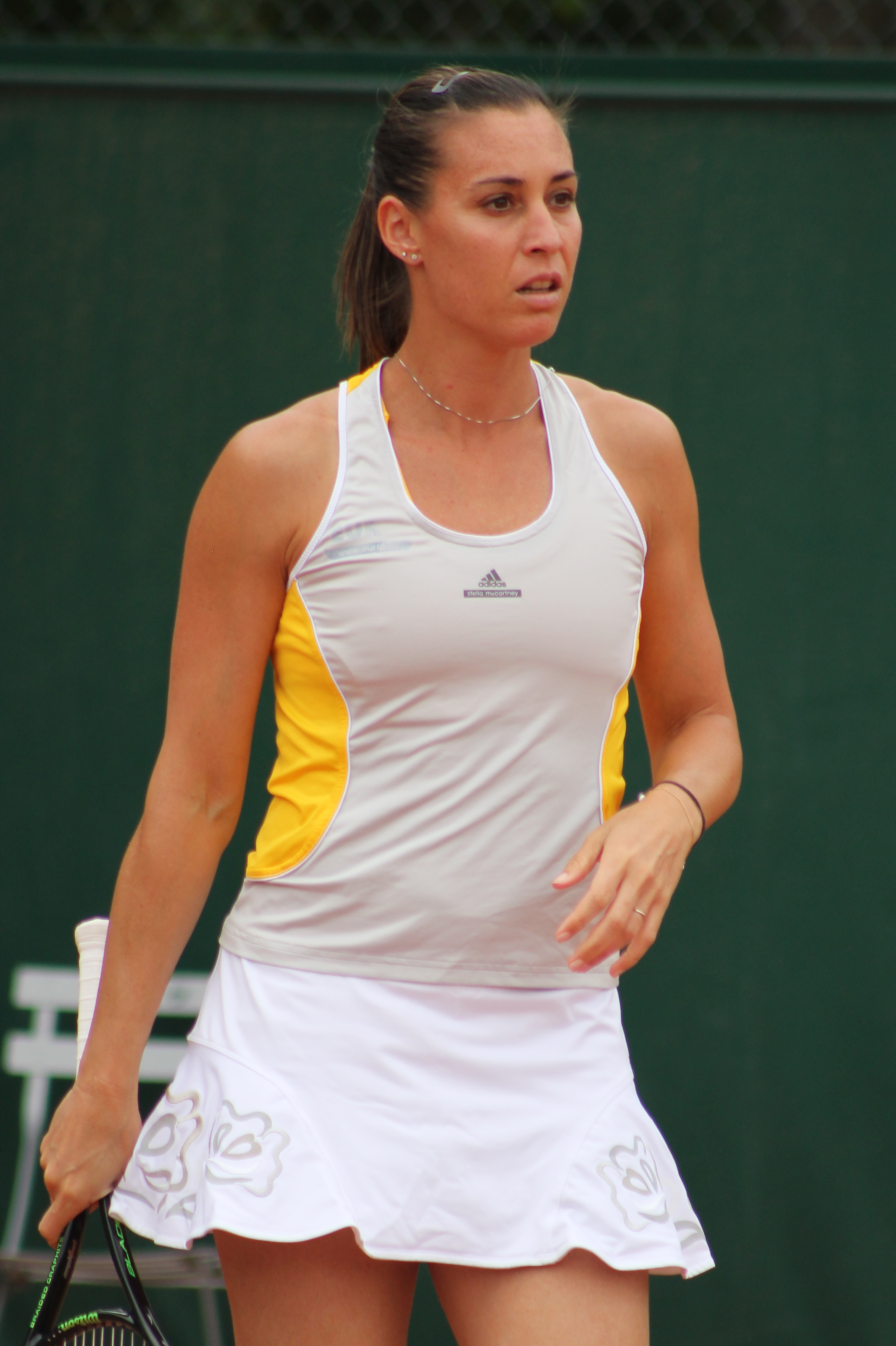 Pennetta RG15 (1)